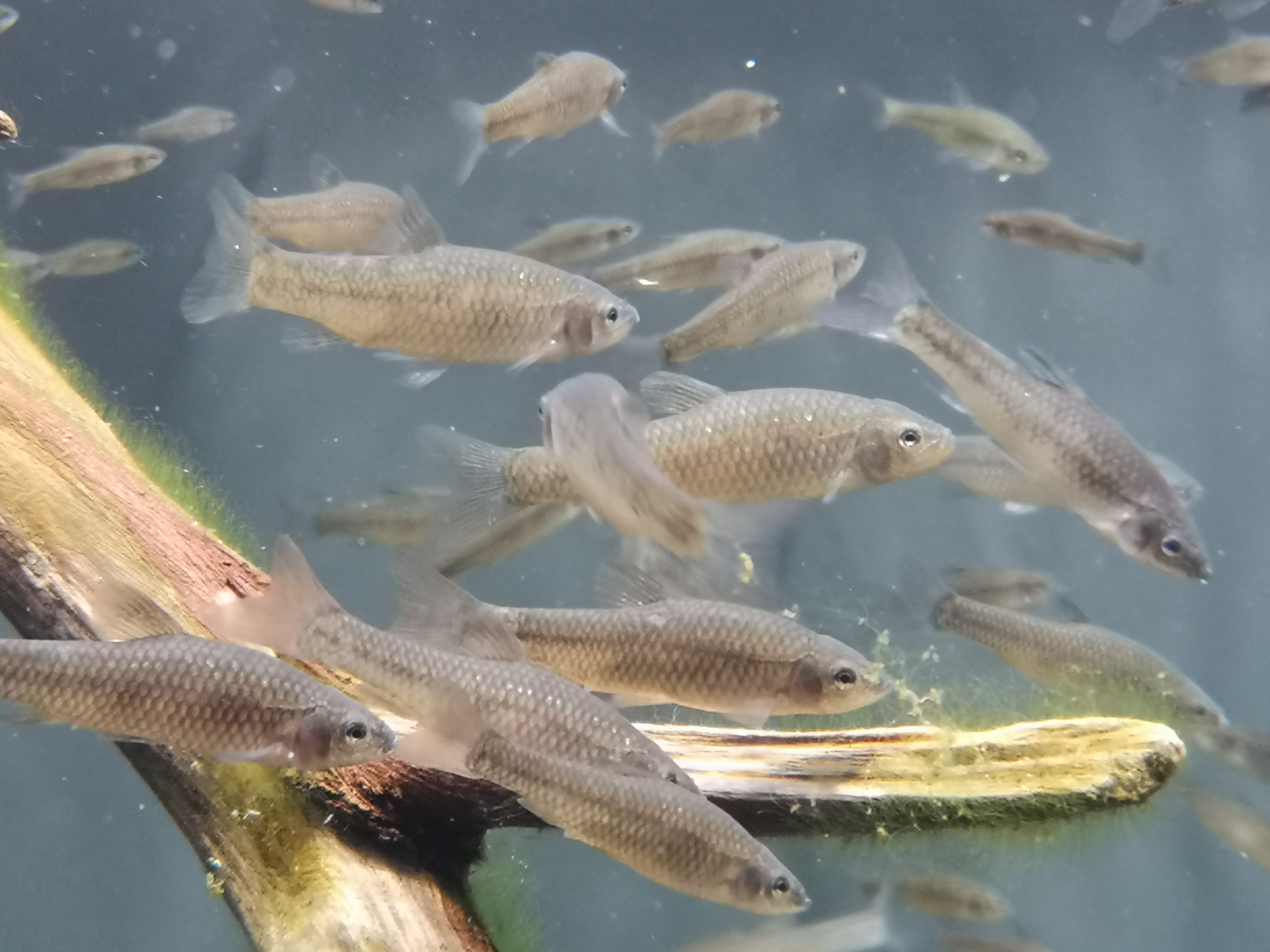 岐阜県、愛知県、三重県に分布する固有種「ウシモツゴ」